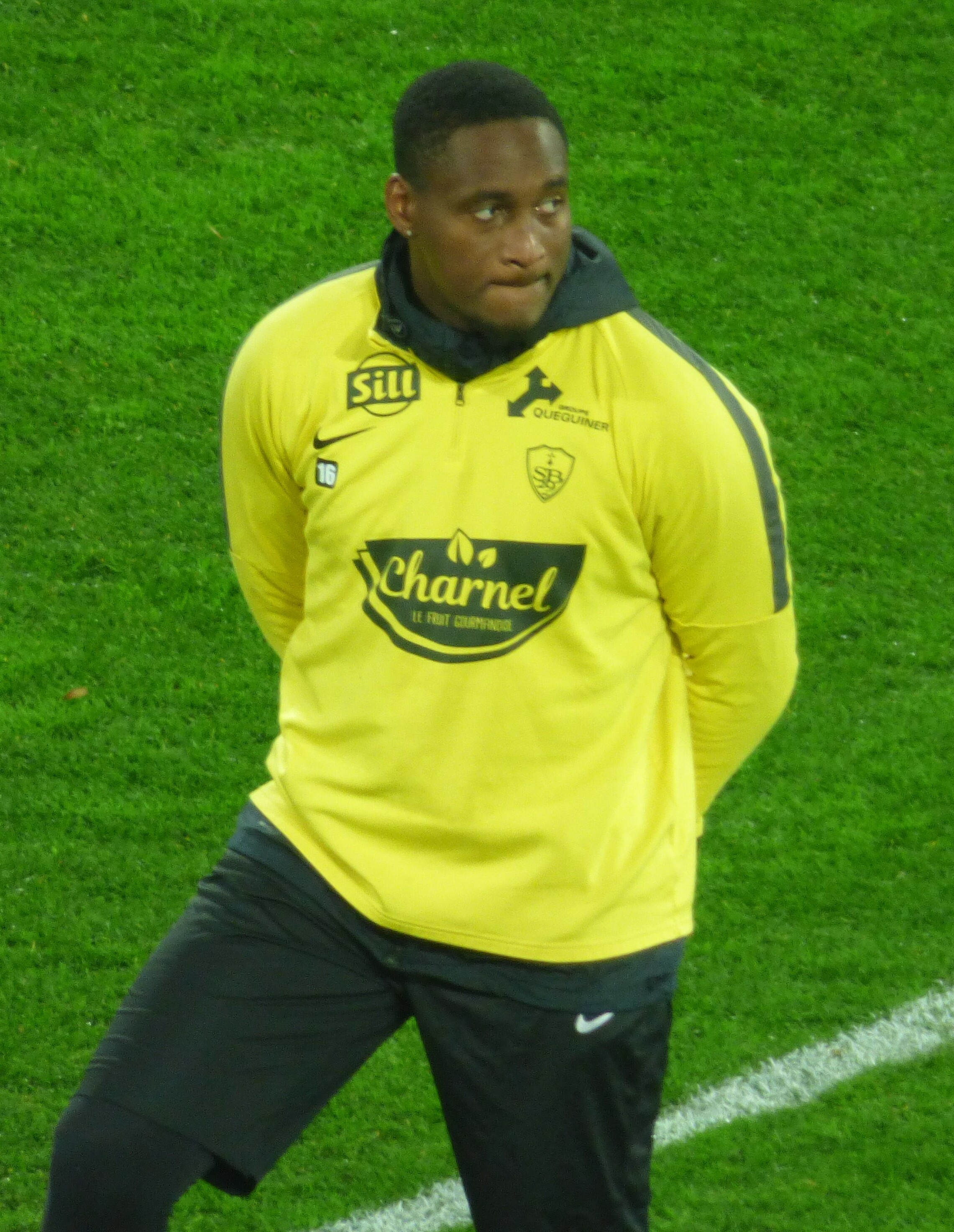 Donovan Léon avant le match RC Lens / Stade brestois, le 4 décembre 2018, comptant pour la dix-septième journée du championnat de France de football de Ligue 2 2018-2019, au Stade Bollaert-Delelis.